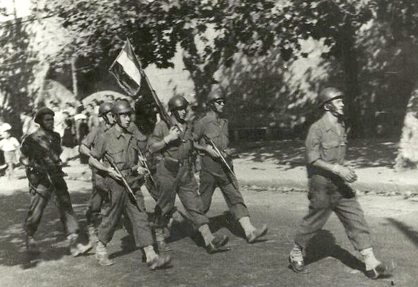 Corse, septembre 1943. Le Choc défile à Ajaccio, le porte drapeau est le sous-lieutenant Saunier de la section expérimentale. Collection Henri Simorre.Autorisation de publier la photographie via le site (Cf.